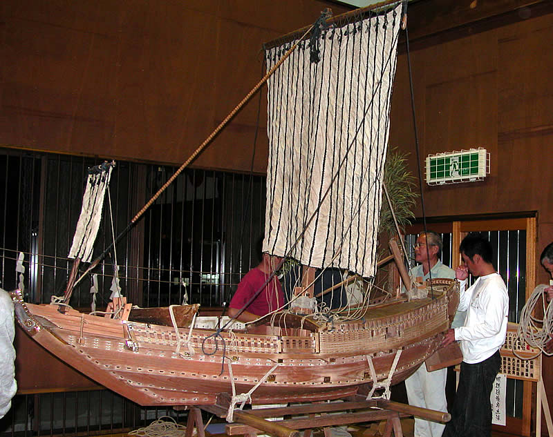 静岡県牧之原市細江で催される神明神社の御船神事